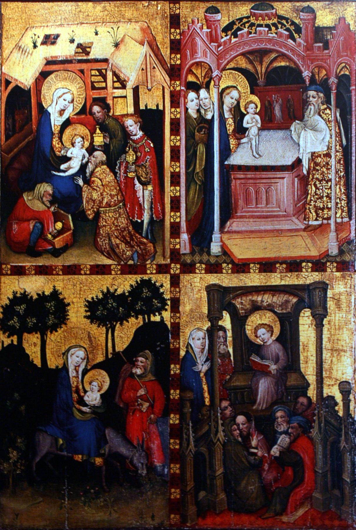 Fröndenberg Stiftskirche, Marienaltar. Rechts Seite:Anbetung der Könige, Darbringung in Tempel, Flucht nach Ägypten, Zwölfjahrigen Jesu im Tempel